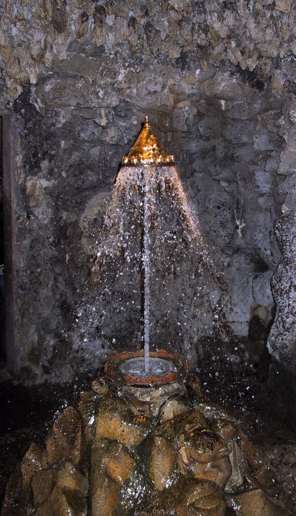 Wasserspiele in Schloß Hellbrunn / Die Krone kann durch wechselnden Wasserdruck hinaufgehoben werden und symbolisiert so den Aufstieg und Fall der Macht.